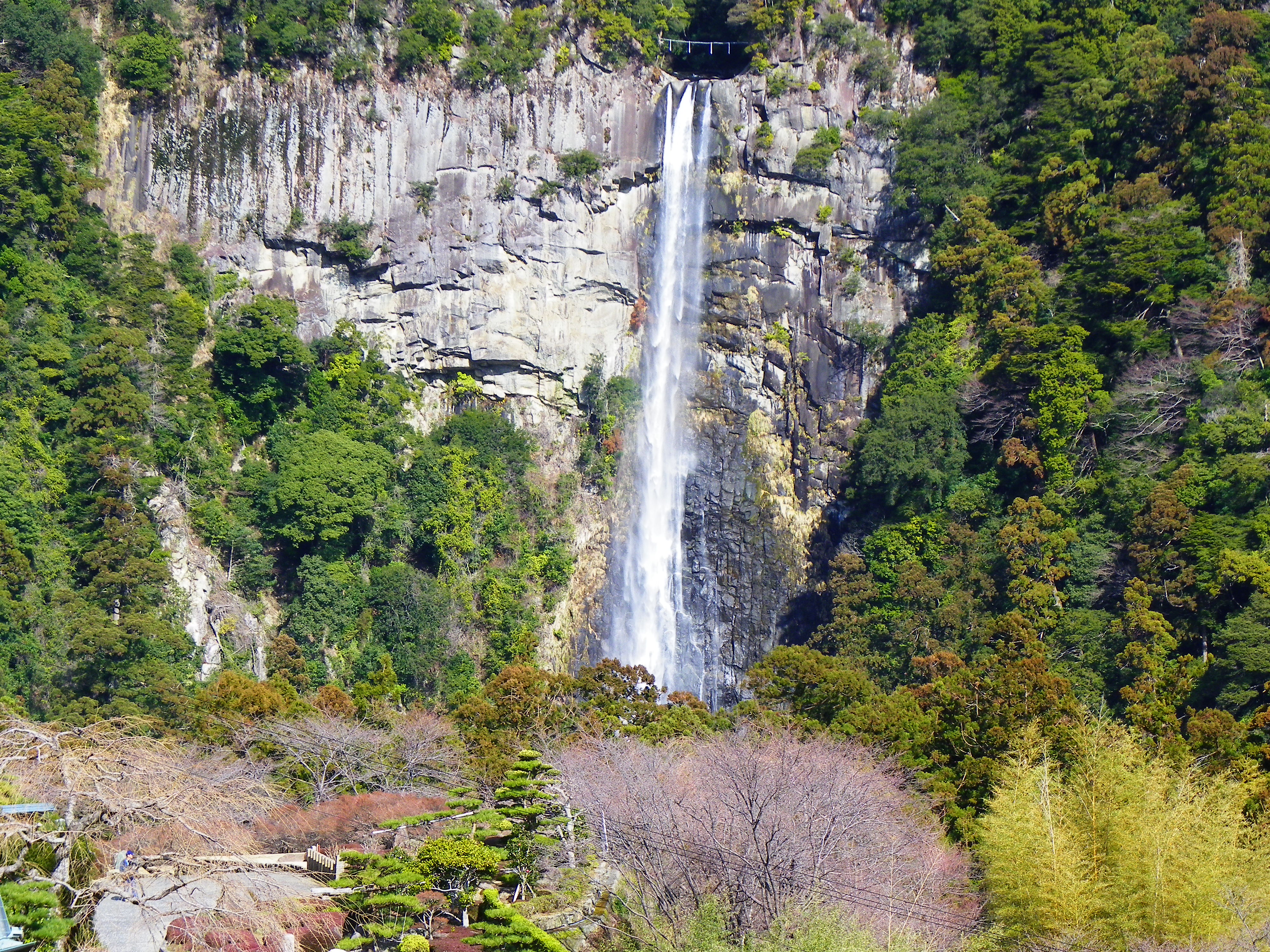 青岸渡寺展望台から望む那智の大滝。